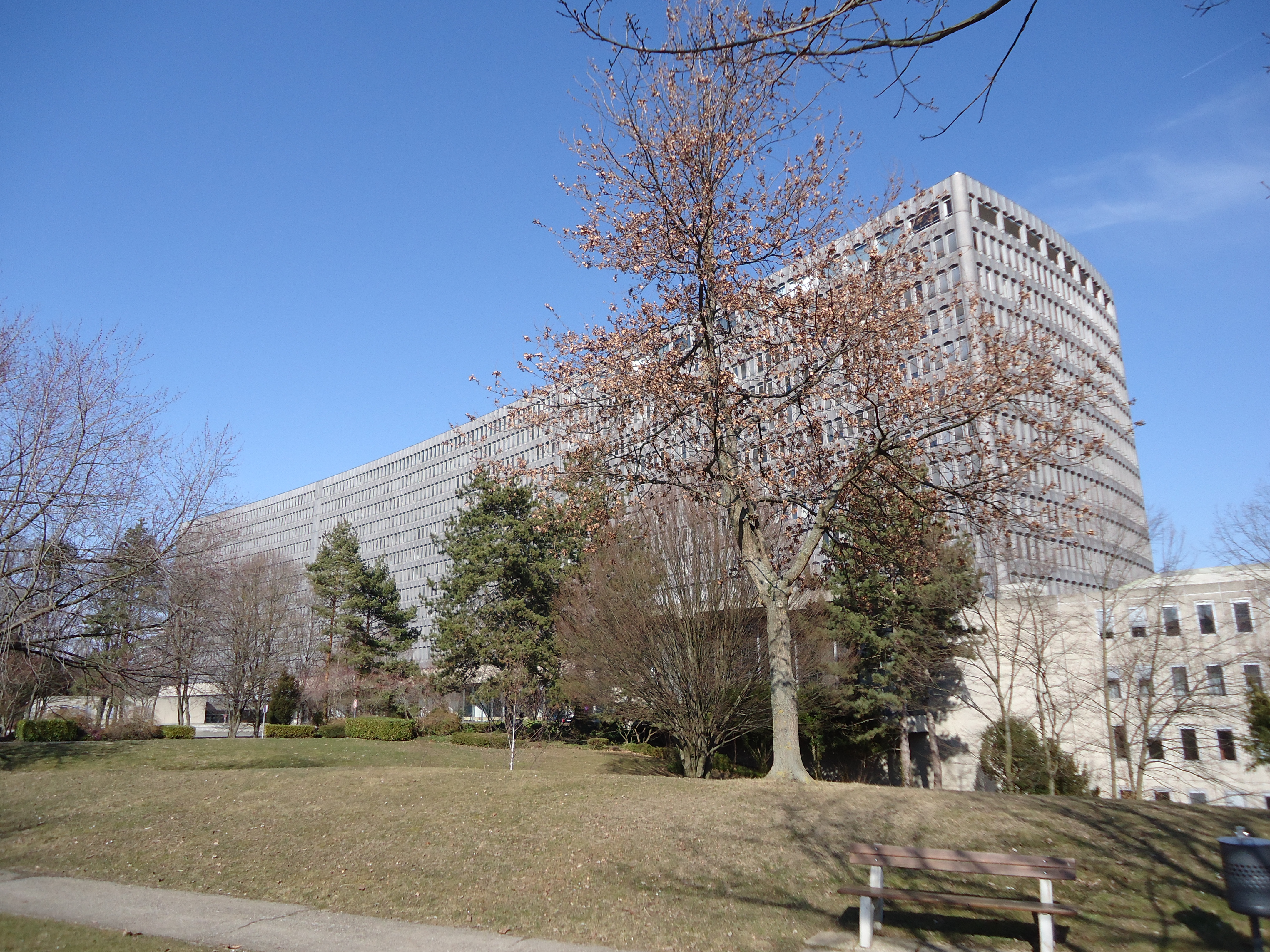 Bureau International du Travail, Genève